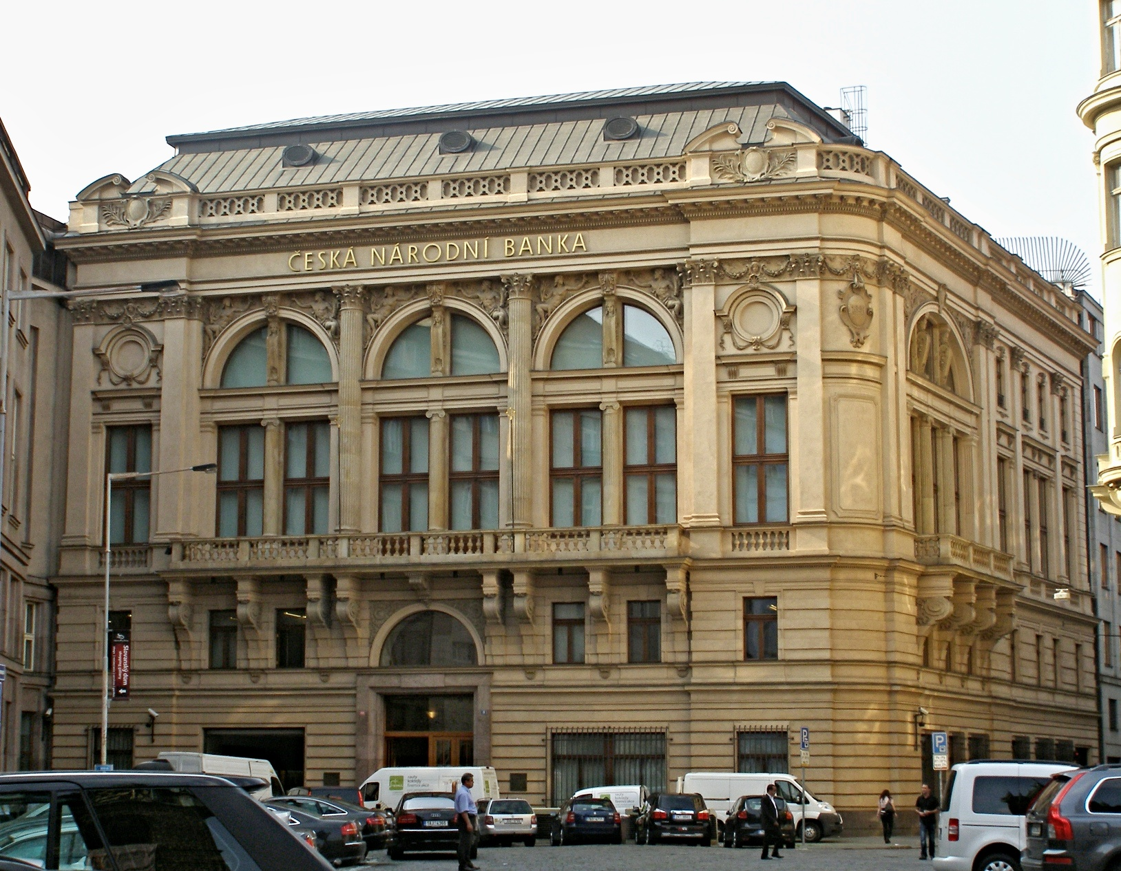 Burza Plodinová (Nové Město), Praha 1, Senovážné nám. 866/30, Nové Město